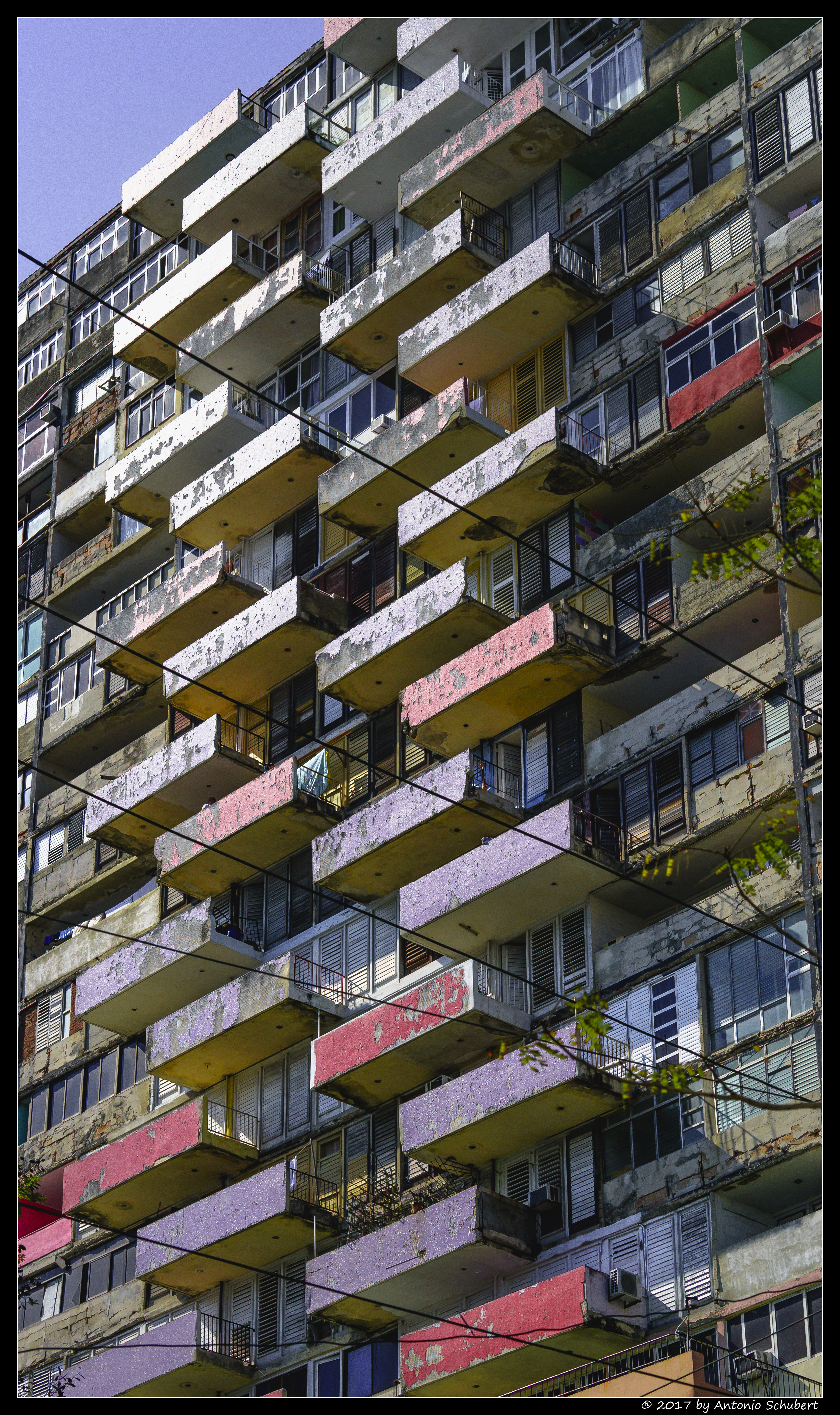 Edifício del Seguro Médico